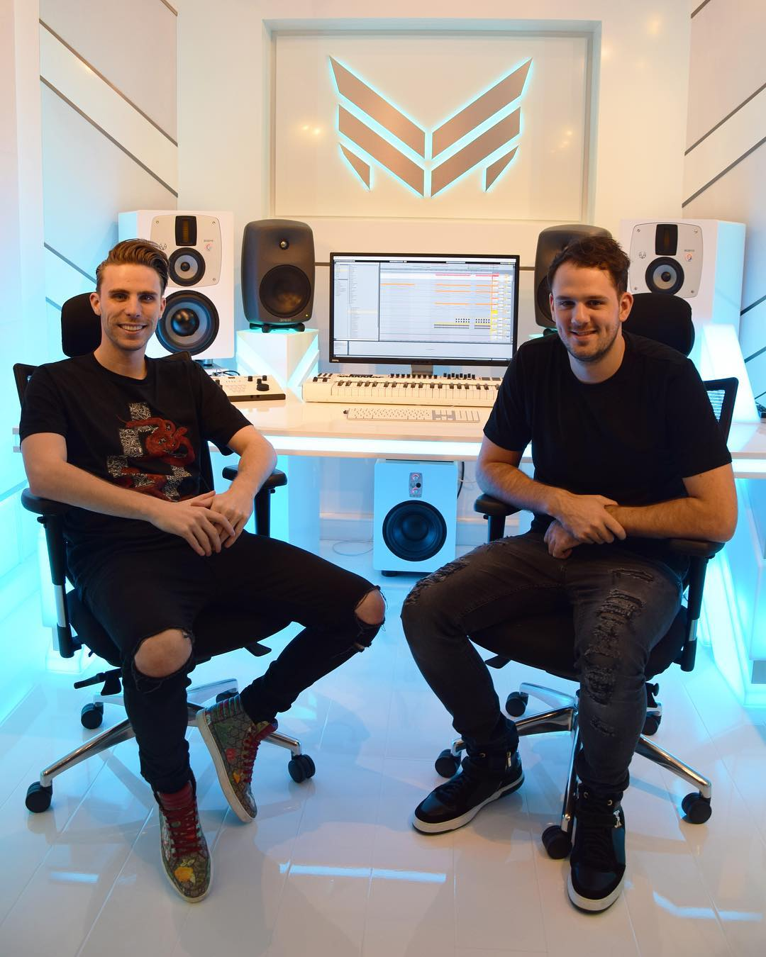 W&W in the studio